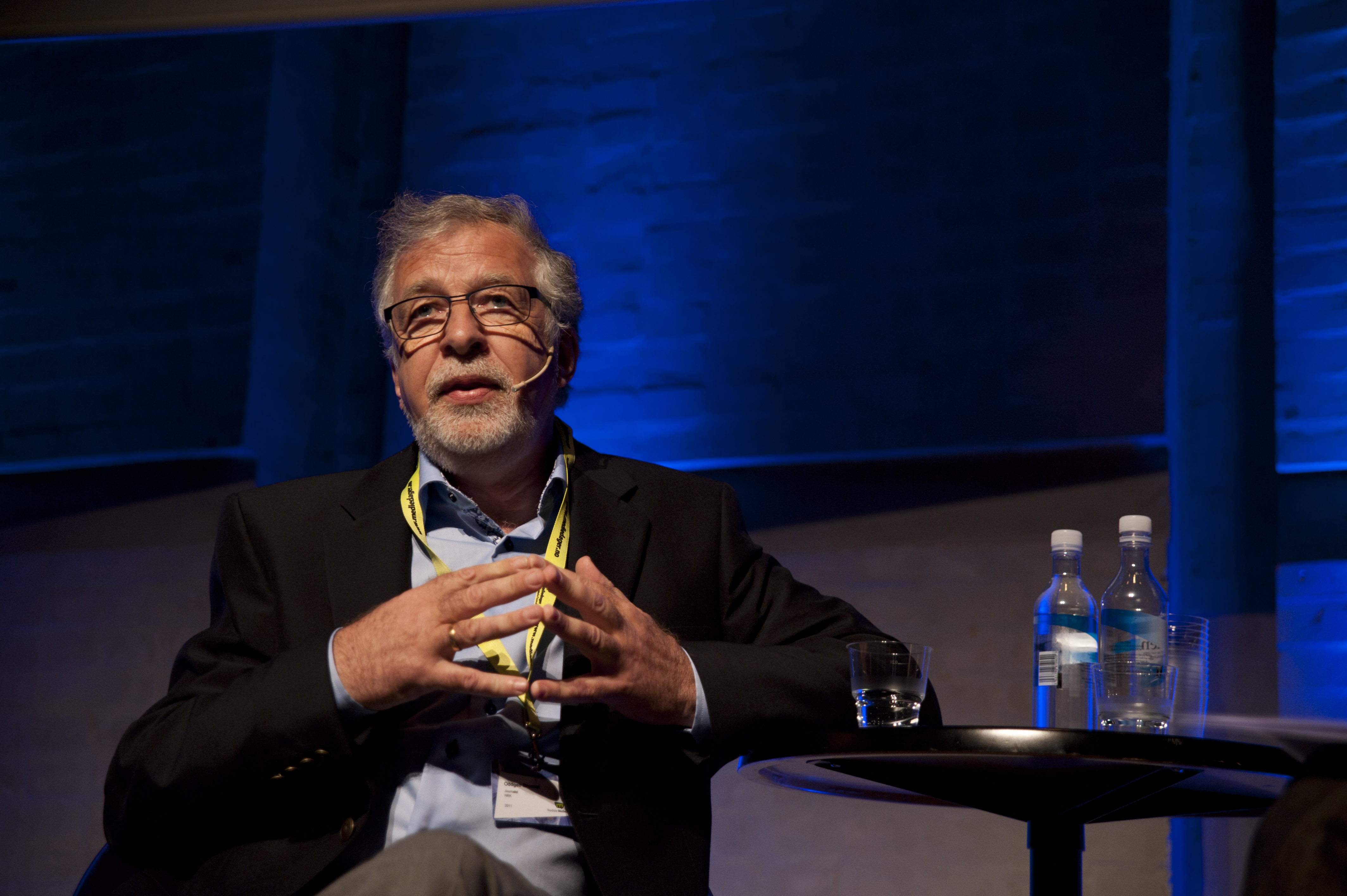 Oddgeir Bruaset, Nordiske Mediedager 2011, foto: Trude S. Pedersen